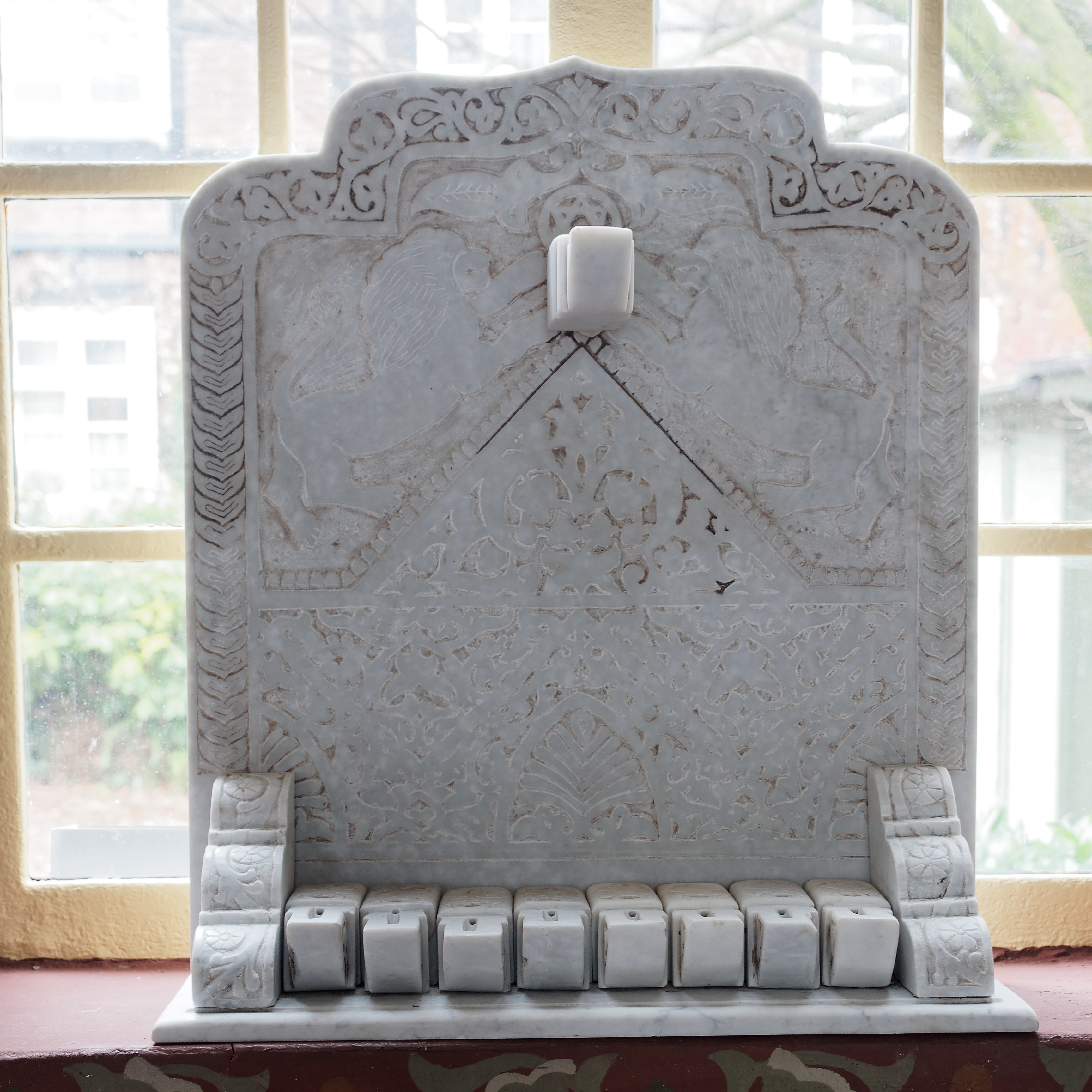 Öl Hanukiah in der ehemaligen Synagoge, heute Haus Neheimer Jäger, in Arnsberg-Neheim